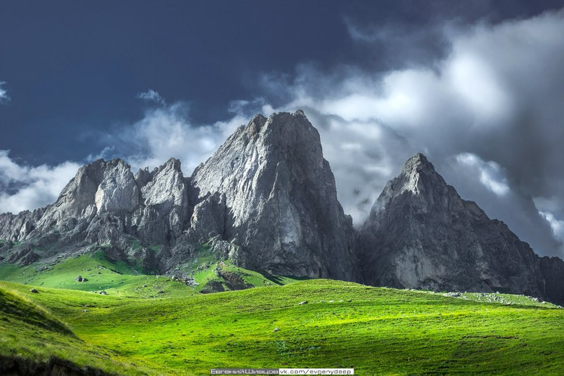 ЦIей-лоам - священная гора ингушей. Находится в Джейрахском районе Республики Ингушетия